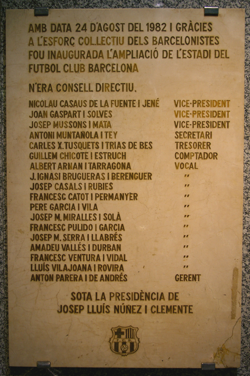 Placa commemorativa de l'ampliació del Camp Nou (1982)